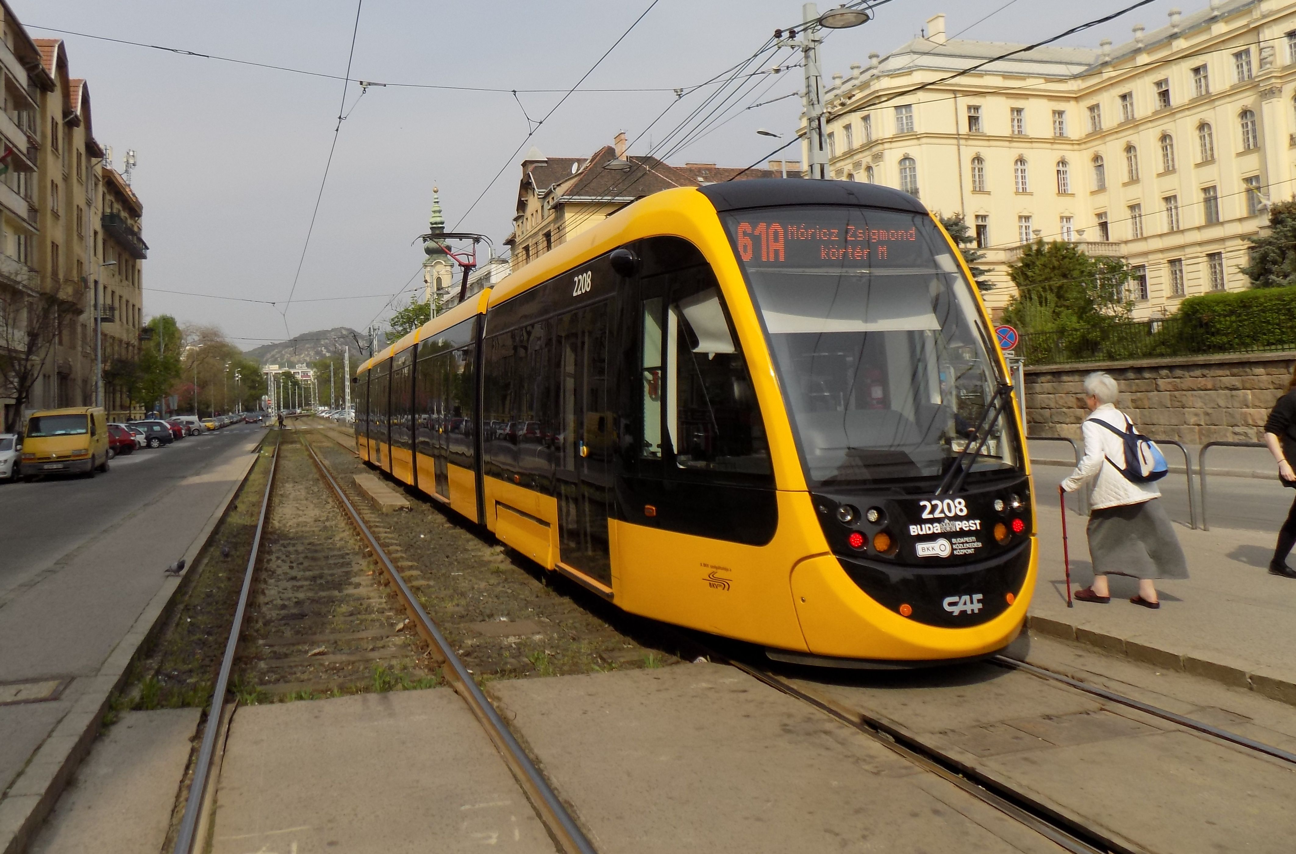 61A jelzésű ideiglenes járat a BAH-csomópont és környékének hatósági zárása alatt a Villányi út Móricz Zsigmond körtér megállónál (CAF Urbos 3; psz. 2208)